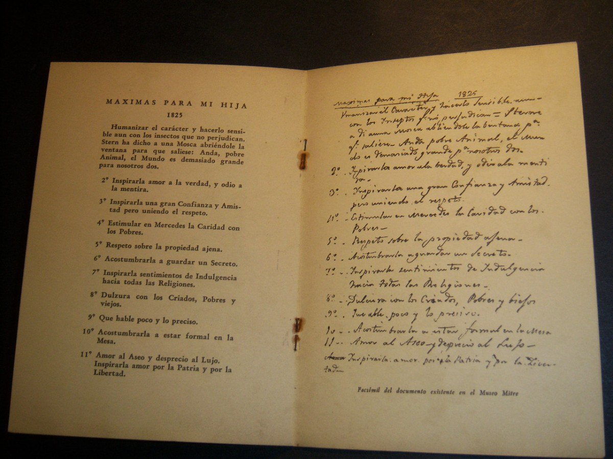 Máximas escritas por el General José de San Martín para su hija Merceditas.